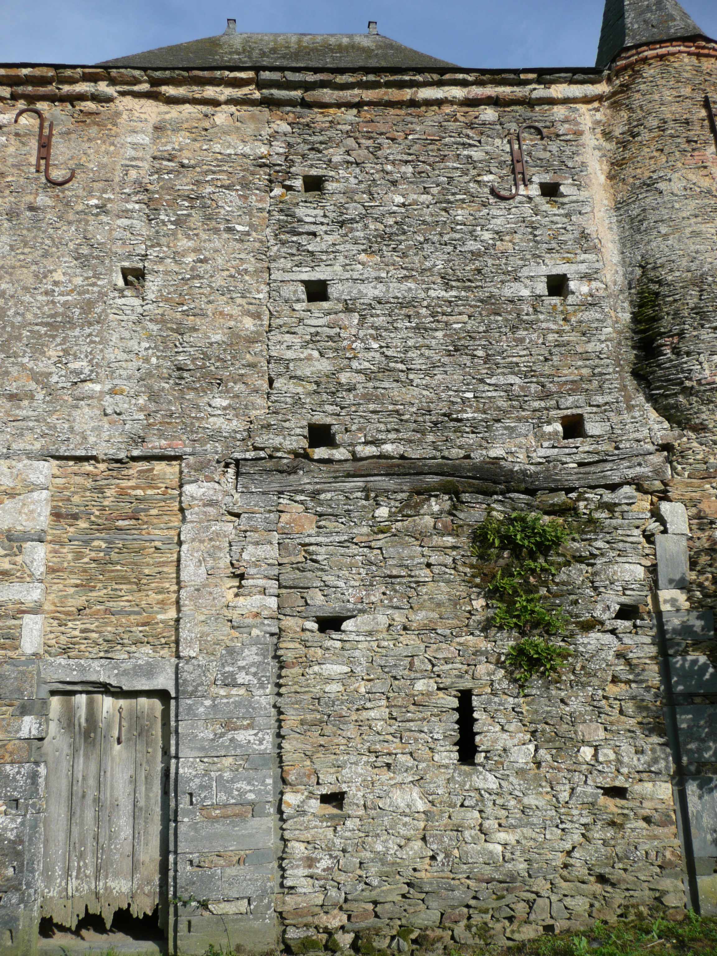 Challain - Manoir de la Cour des Aulnays - Vestiges pont-levis